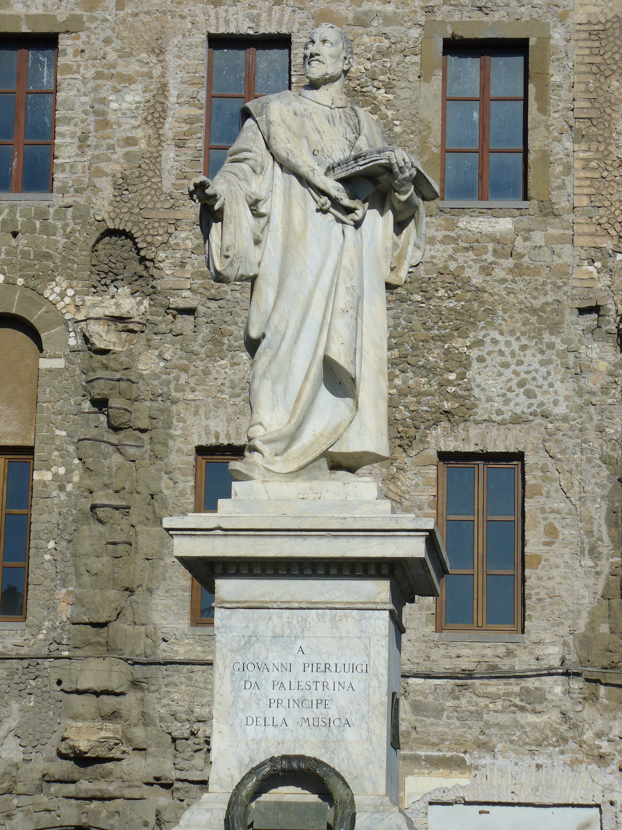 Palestrina (Italy) - Statua di Pierluigi da Palestrina